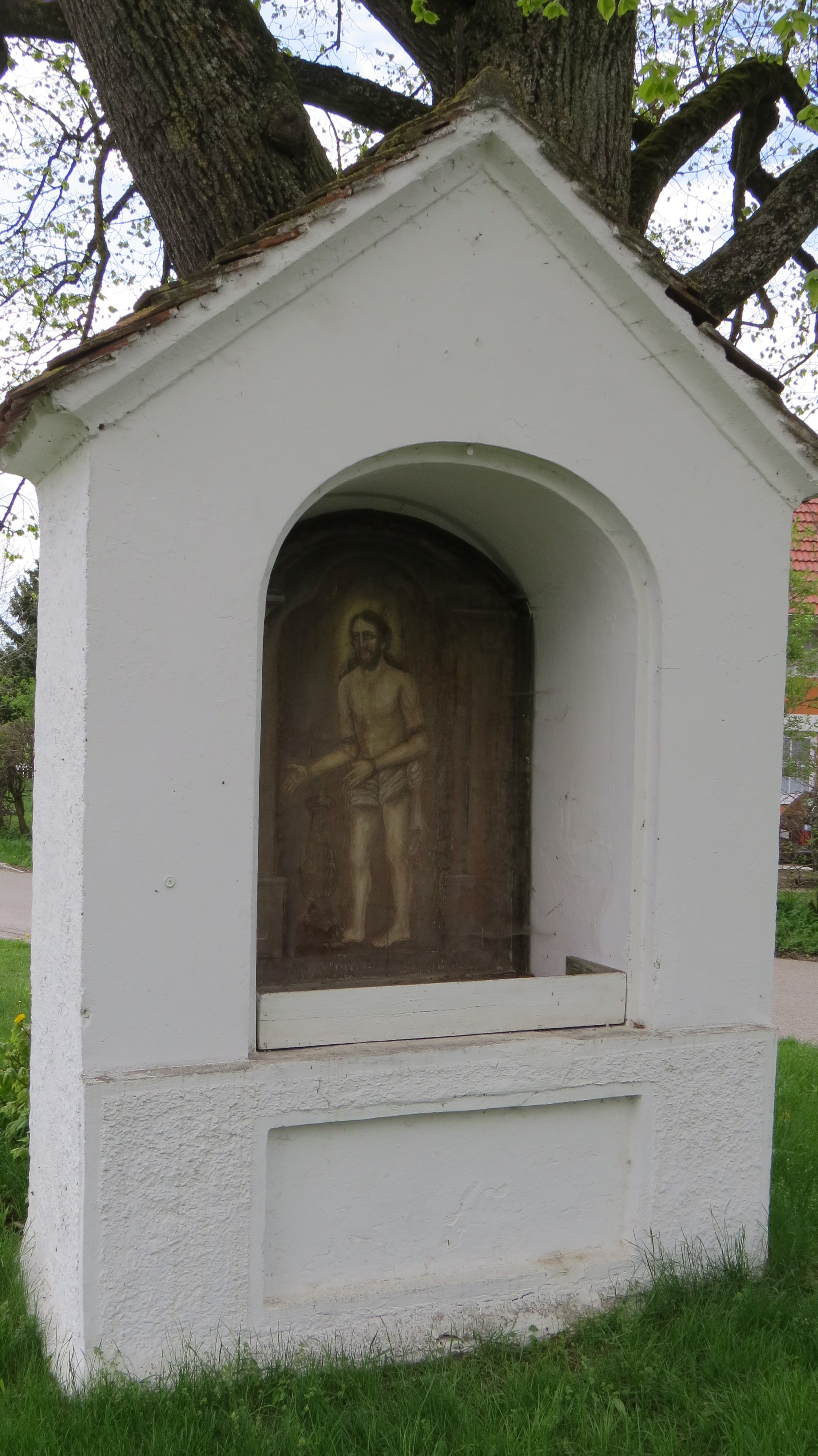 Bildstock Saulengrainer Str. in Apfeltrach